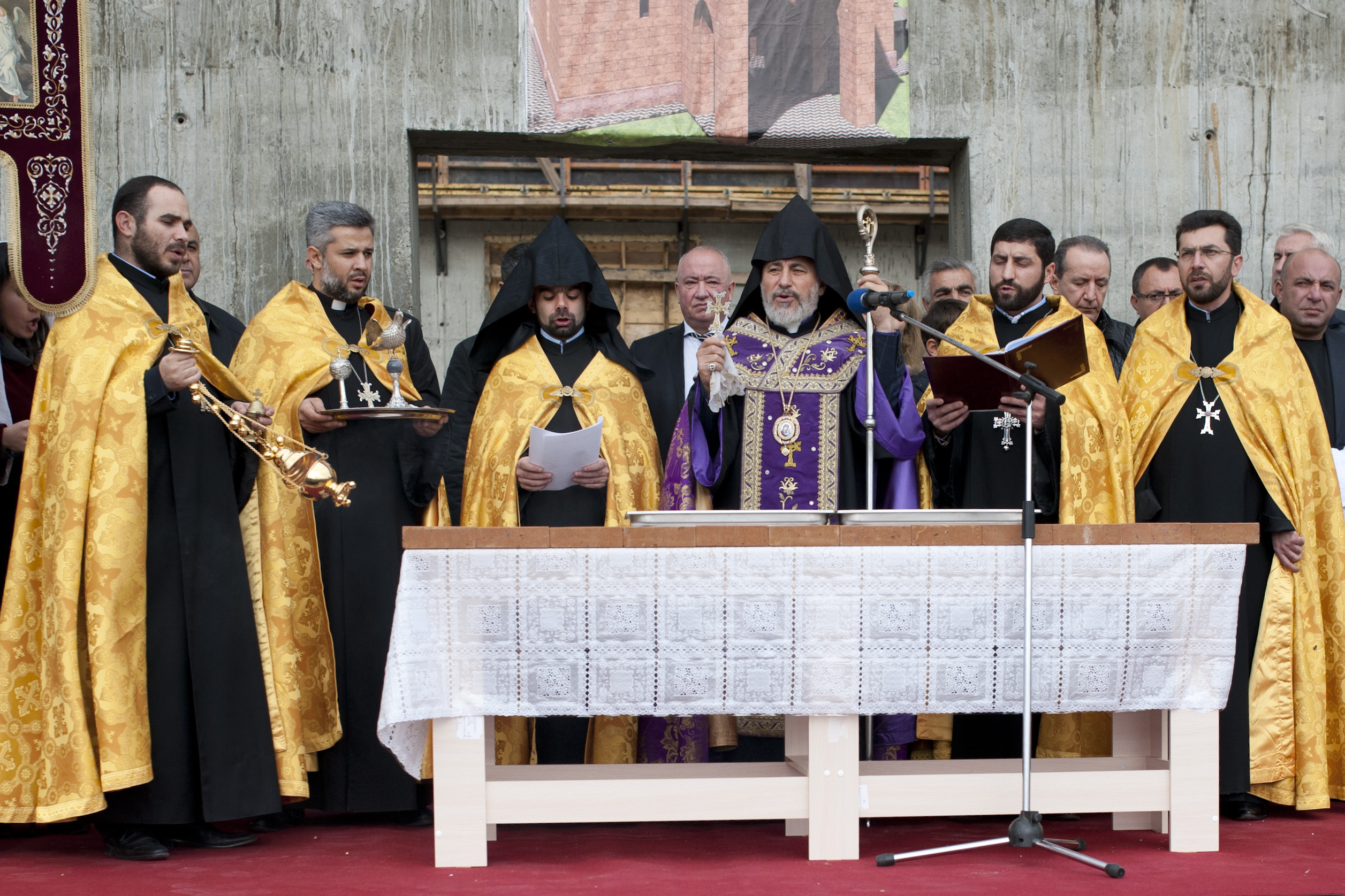 Глава Ново-Нахичеванской и Российской епархии Армянской Апостольской Церкви архиепископ Езрас проводит церемонию освящения закладных камней.